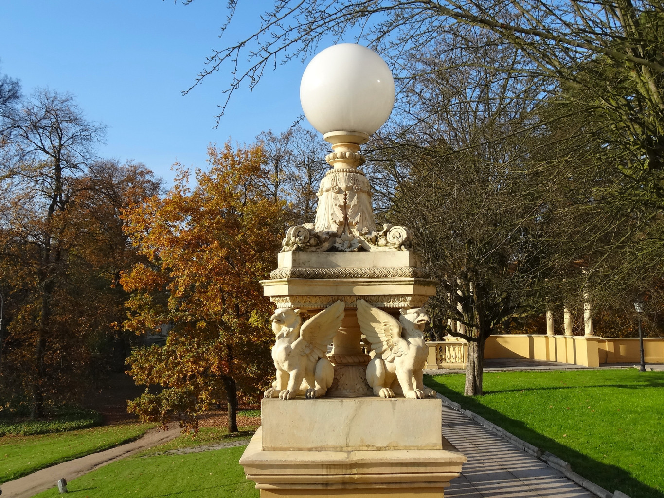 Ostromecko k. Bydgoszczy, pałac, tzw. Nowy, zbud. 1835-1848, 1891